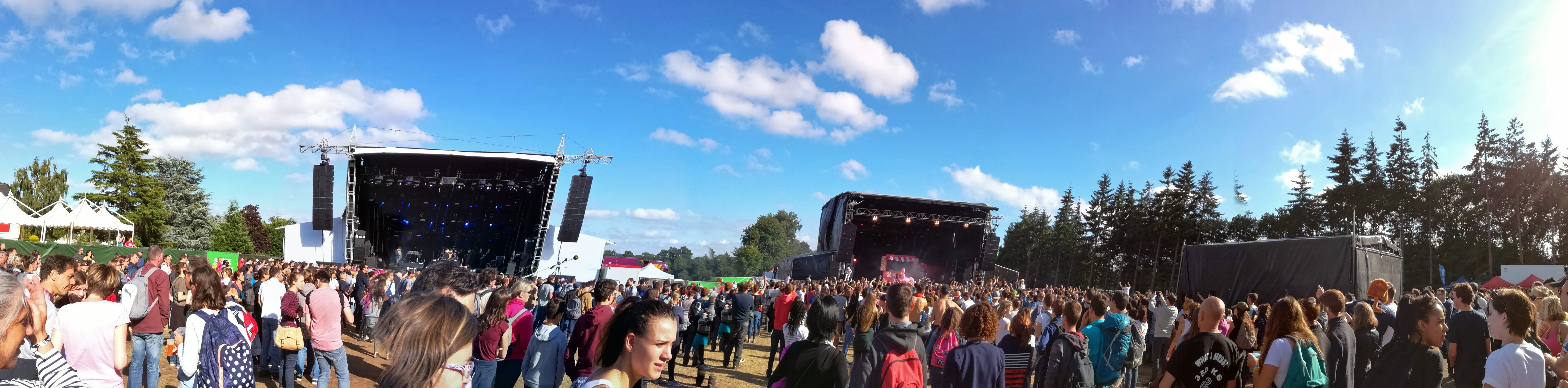 Panoramique des 2 scènes du festival de Bobital L'Armor à sons à l'ouverture du samedi 1er juillet 2017.